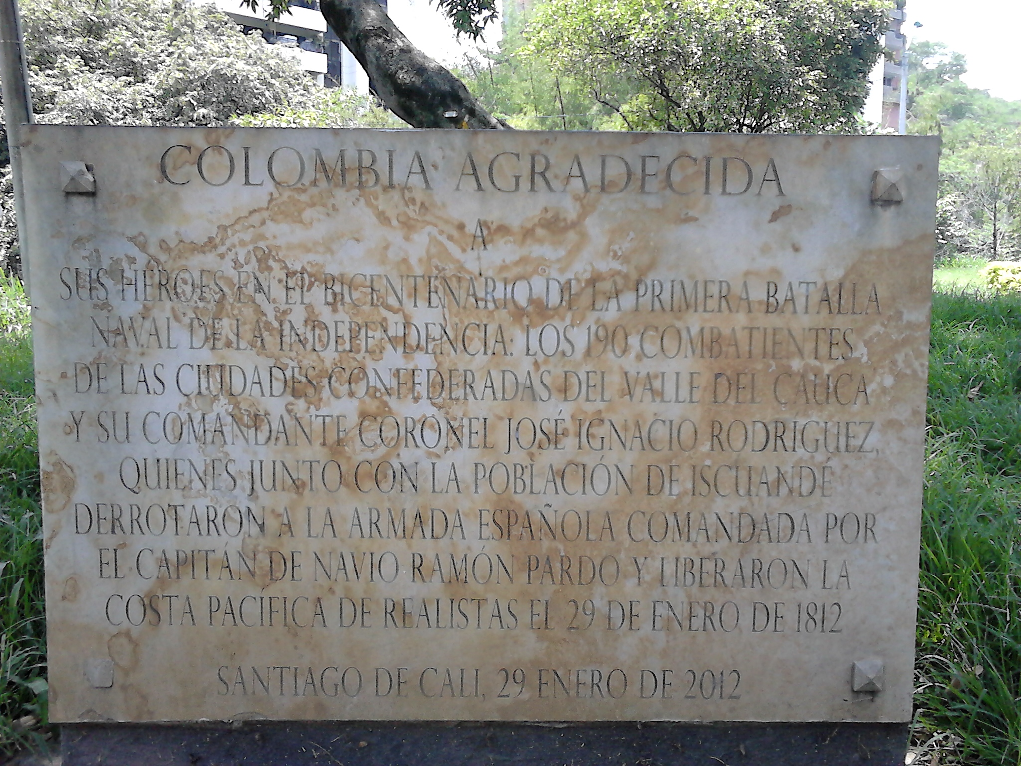 Placa conmemorativa del bicentenario de la Batalla de Iscuandé. Primera batalla naval de la Independencia de Colombia llevada a cabo por tropas de las Ciudades Confederadas del Valle del Cauca. "COLOMBIA AGRADECIDA A SUS HÉROES EN EL BICENTENARIO DE LA PRIMERA BATALLA NAVAL DE LA INDEPENDENCIA. LOS 190 COMBATIENTES DE LAS CIUDADES CONFEDERADAS DEL VALLE DEL CAUCA Y SU COMANDANTE CORONEL JOSÉ IGNACIO RODRIGUEZ, QUIENES JUNTO CON LA POBLACIÓN DE ISCUANDÉ DERROTARON A LA ARMADA ESPAÑOLA COMANDADA POR EL CAPITÁN DE NAVÍO RAMÓN PARDO Y LIBERARON LA COSTA PACÍFICA DE REALISTA EL 29 DE ENERO DE 1812. SANTIAGO DE CALI, 29 DE ENERO DE 2012"